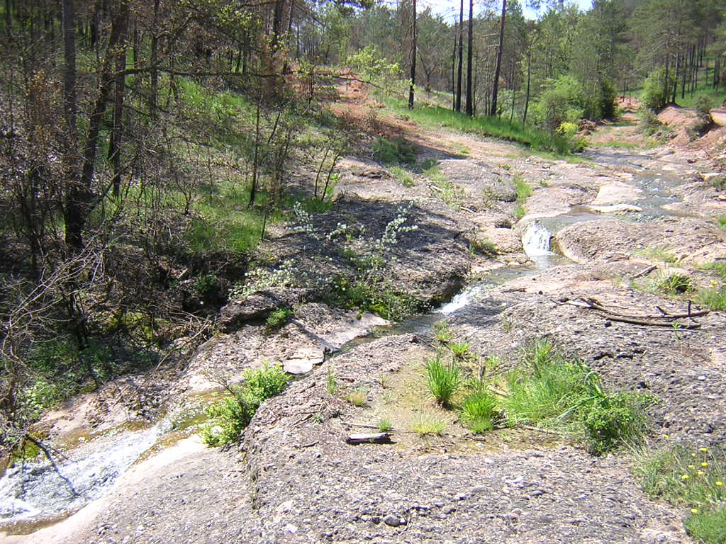 El torrent de les Fraus de l'Otzet (Monistrol de Calders, Moianès)